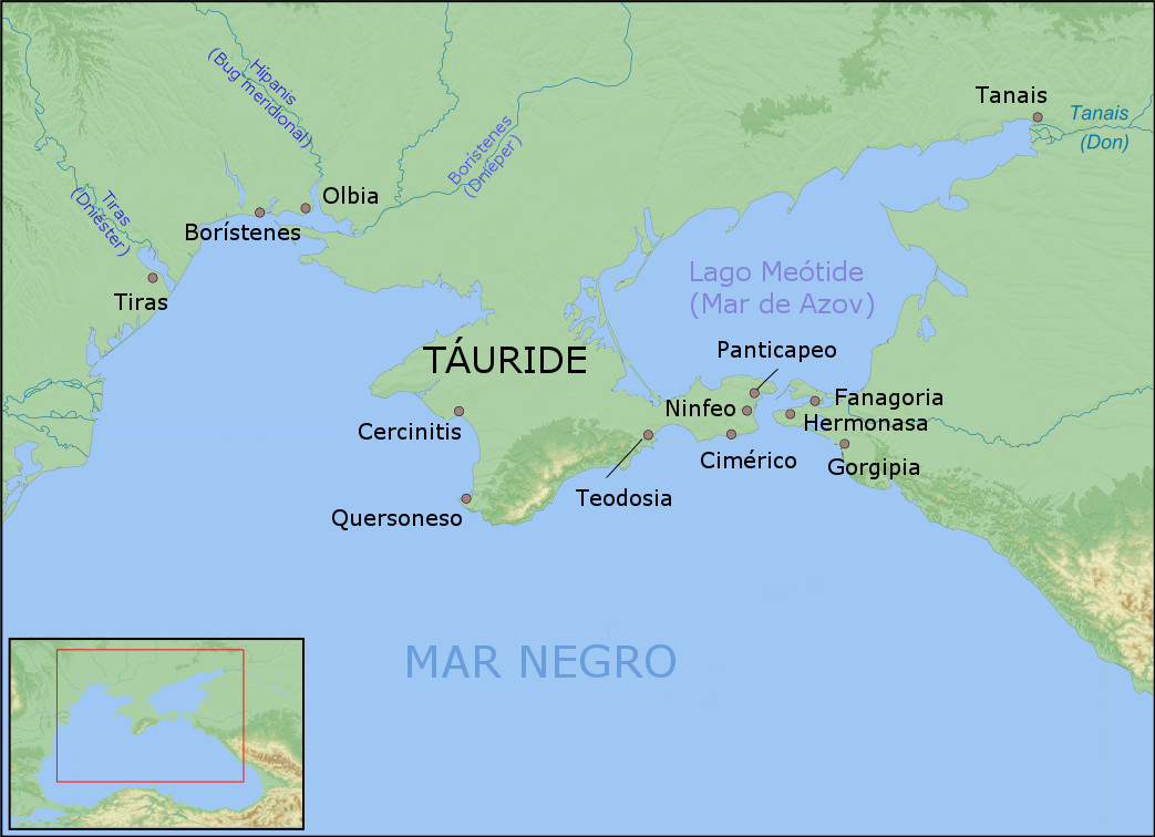 Mapa de las antiguas colonias griegas al norte del Mar Negro.